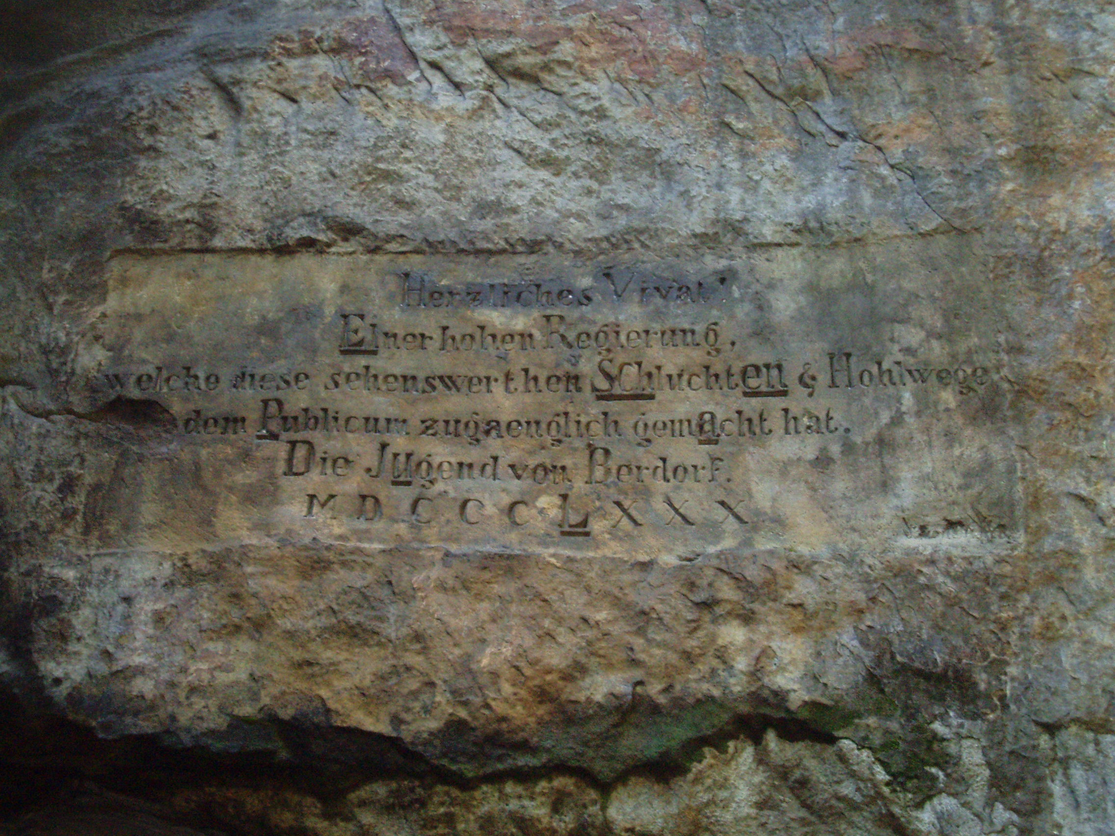 Hohllay Berdorf